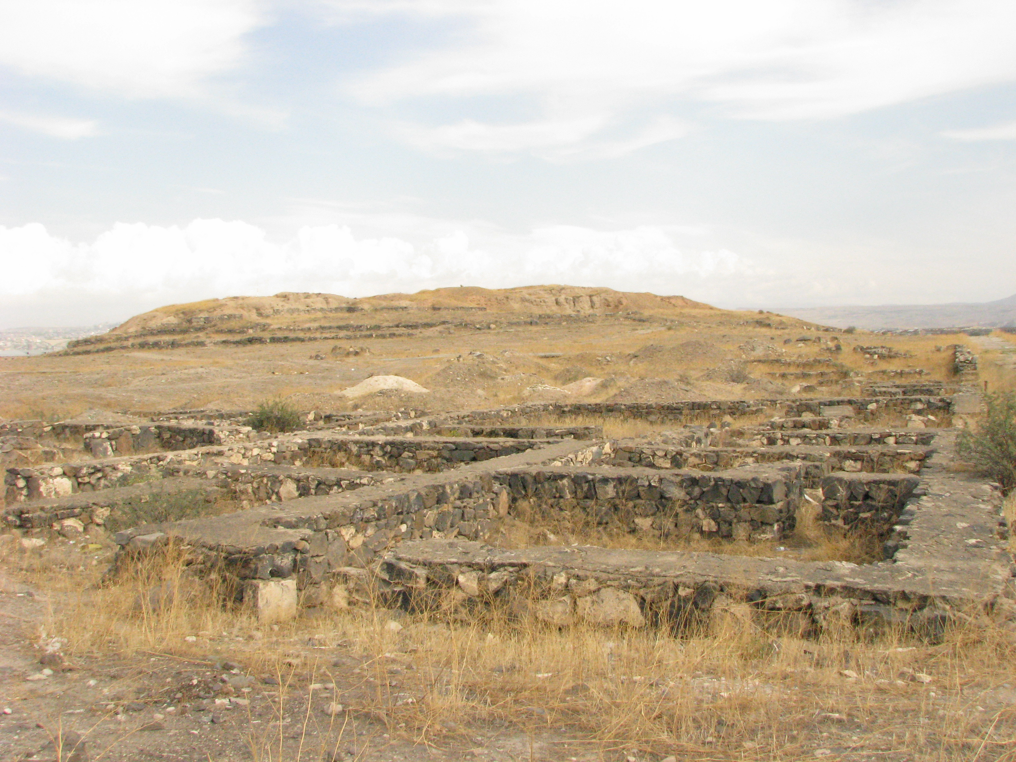 Քաղաքատեղի Թեյշեբաինի 11/22